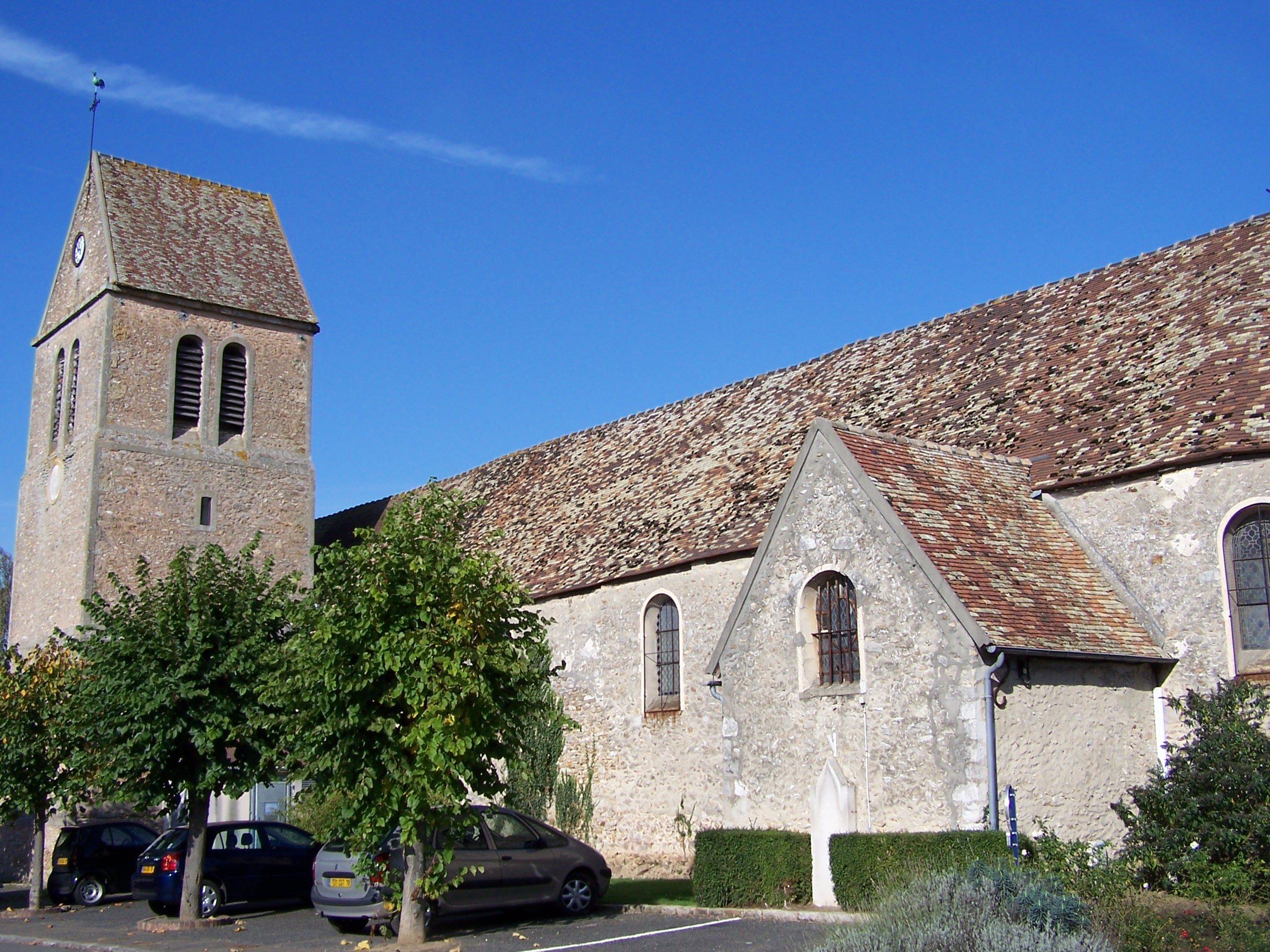 Église de Galluis (Yvelines, France)